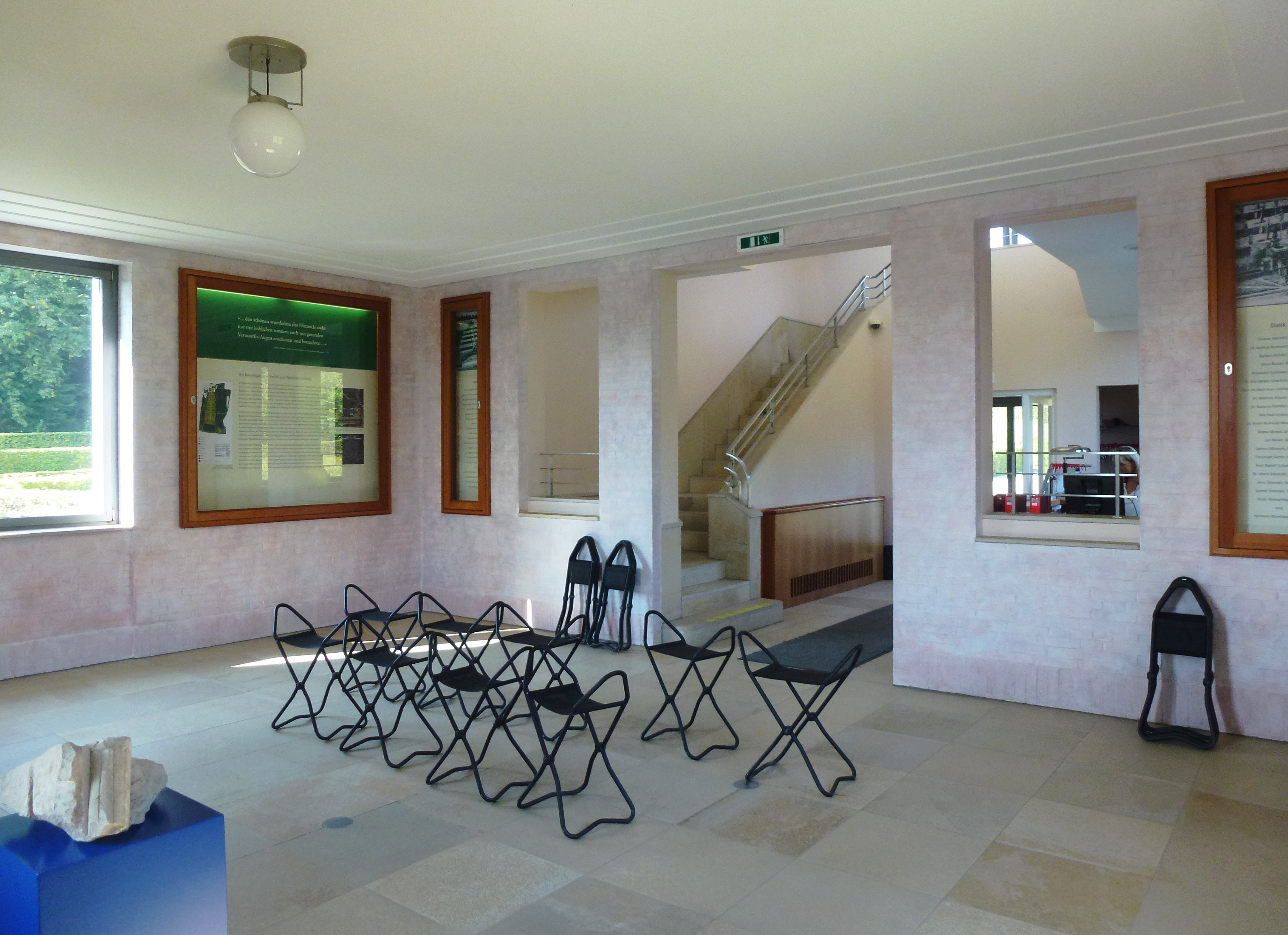 Gottorps glob museum, interiör med A&E Designs museipall "Stockholm II"